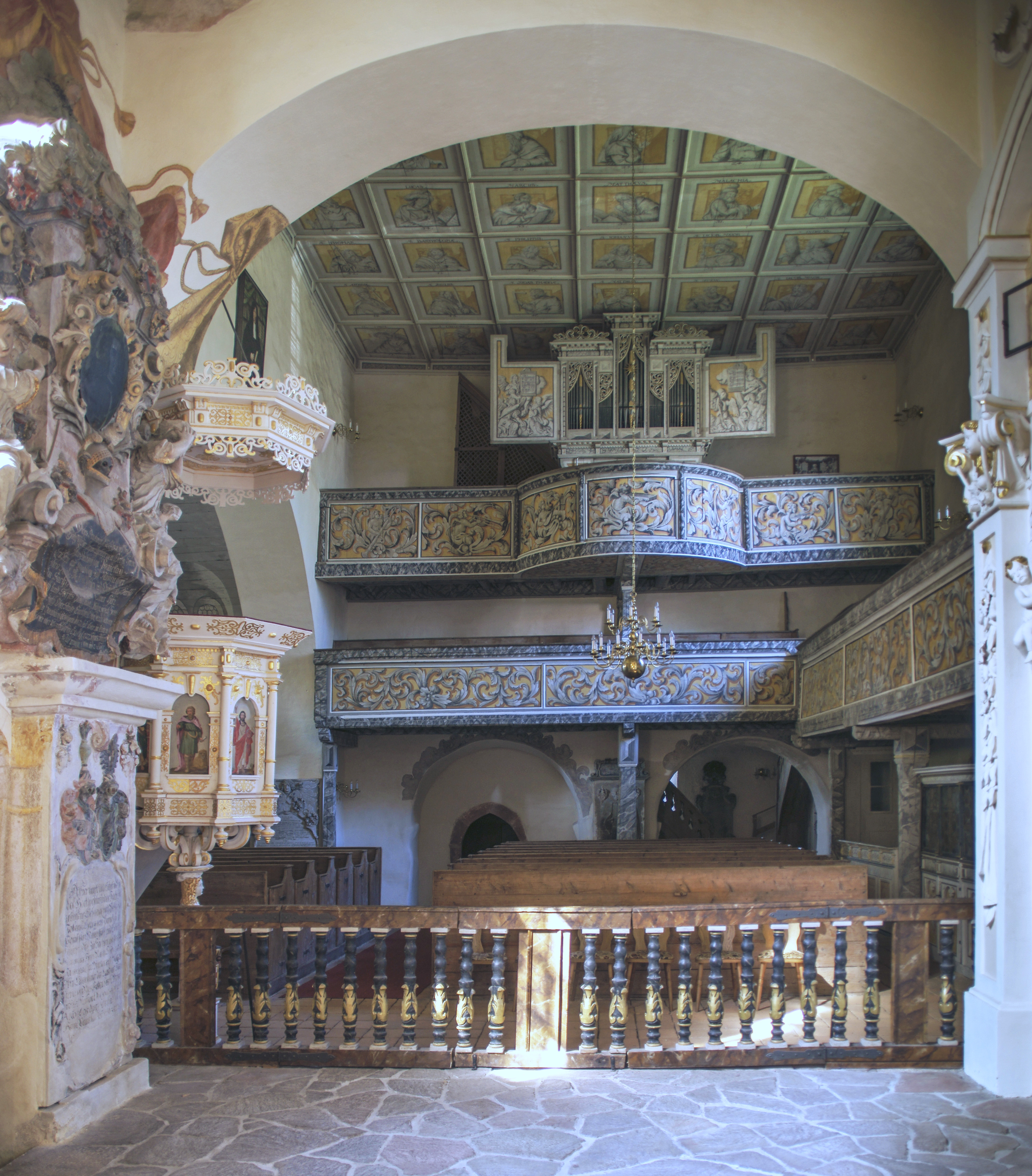 Wehrkirche Pomßen, Gemeinde Parthenstein, Landkreis Leipzig, Sachsen, Deutschland